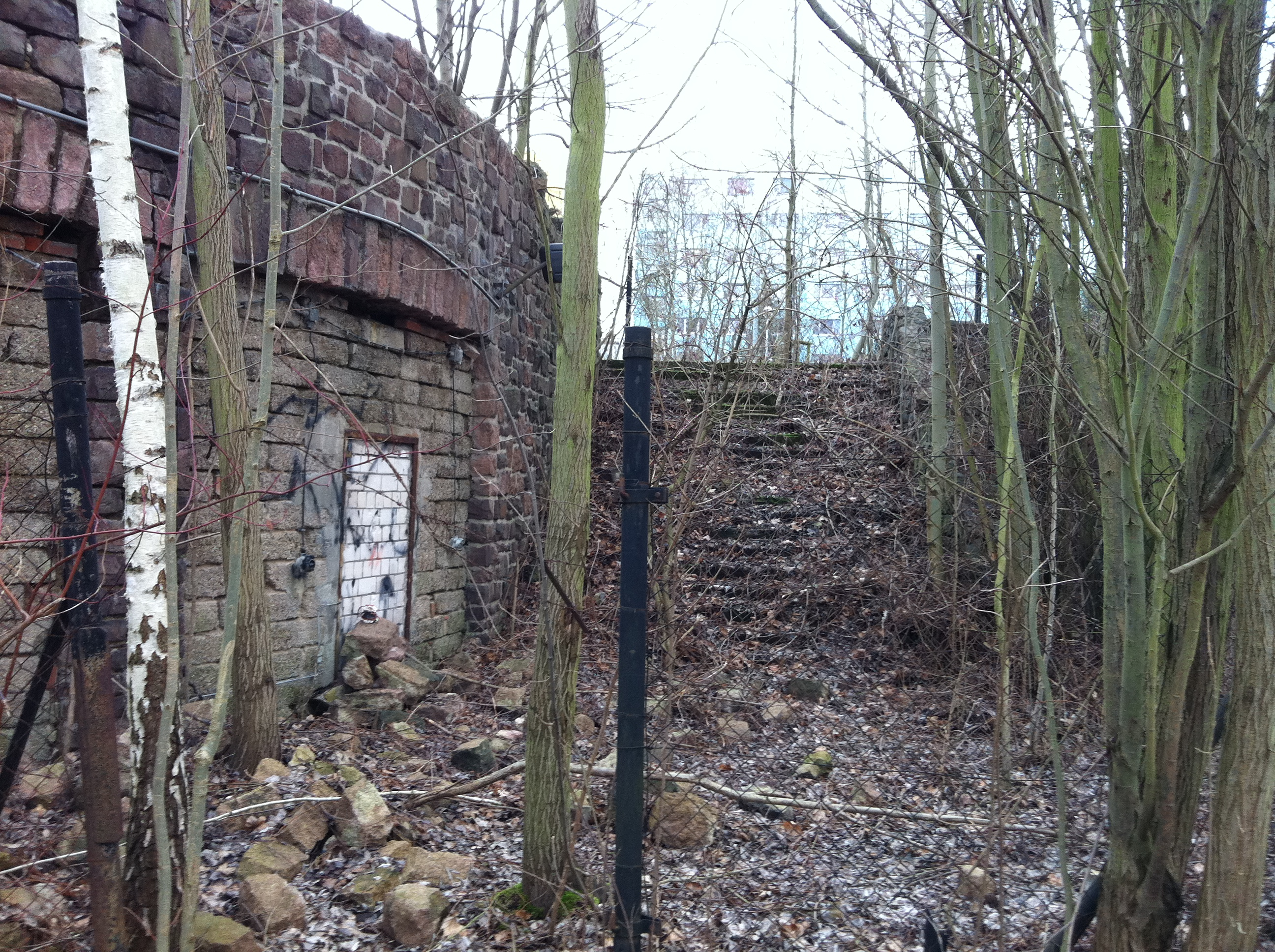 Verfallene Reste der ehemaligen und nie fertiggestellten Thingstätte in den Brandbergen, Halle (Saale)